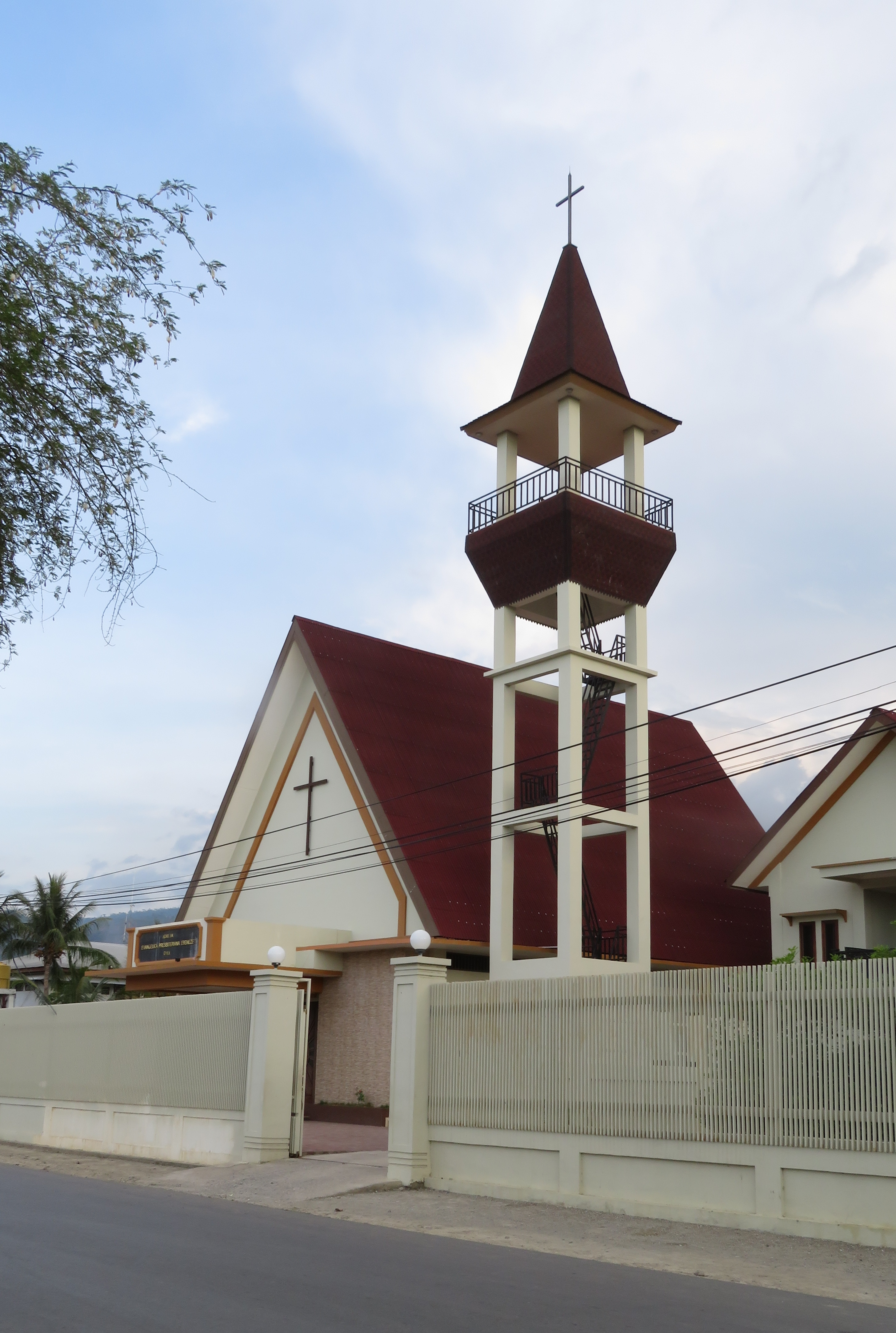 Evangelisch-Presbyterianische Kirche (erb. 2015), Vila Verde, Dili, Osttimor